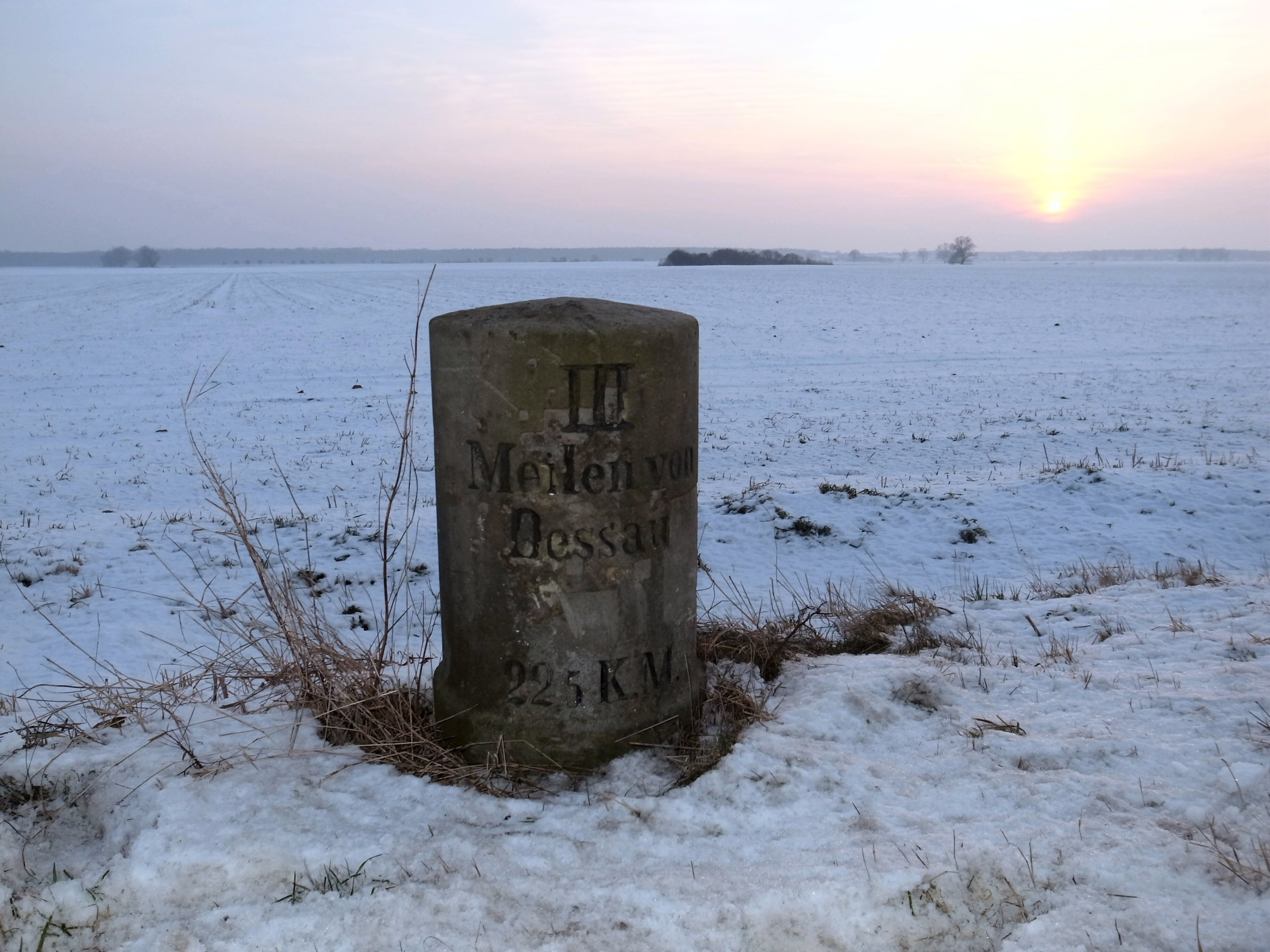 Rehsen, Meilenstein, III Meilen von Dessau 22,5 K.M